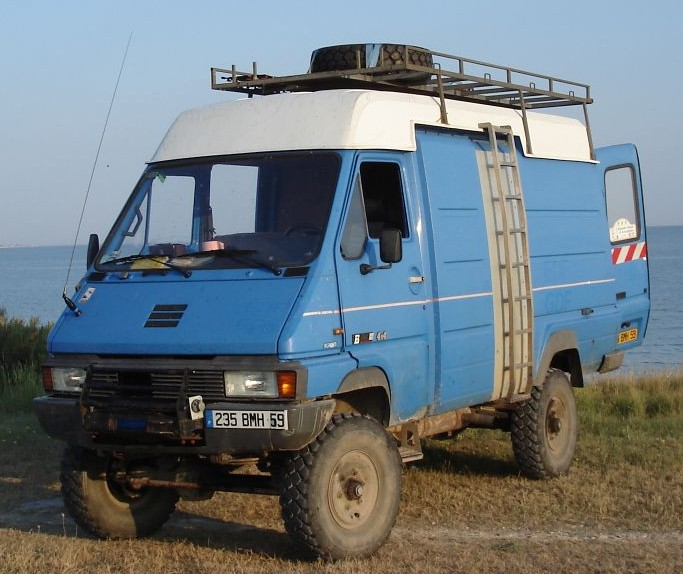 Renault B90 4x4 véhicule ex EDF